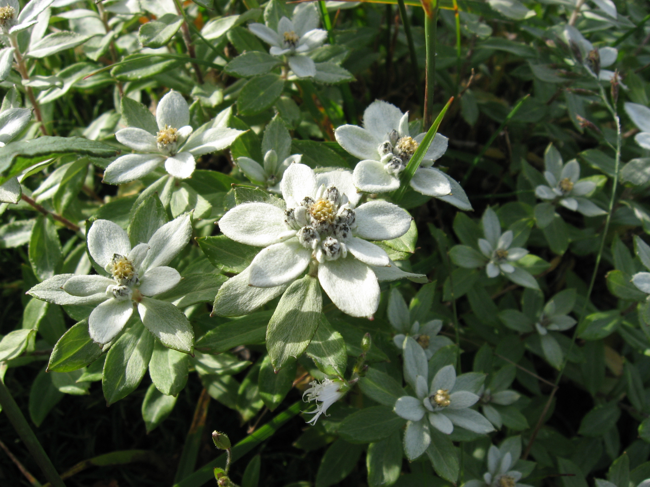 ミネウスユキソウ Leontopodium japonicum var. shiroumense